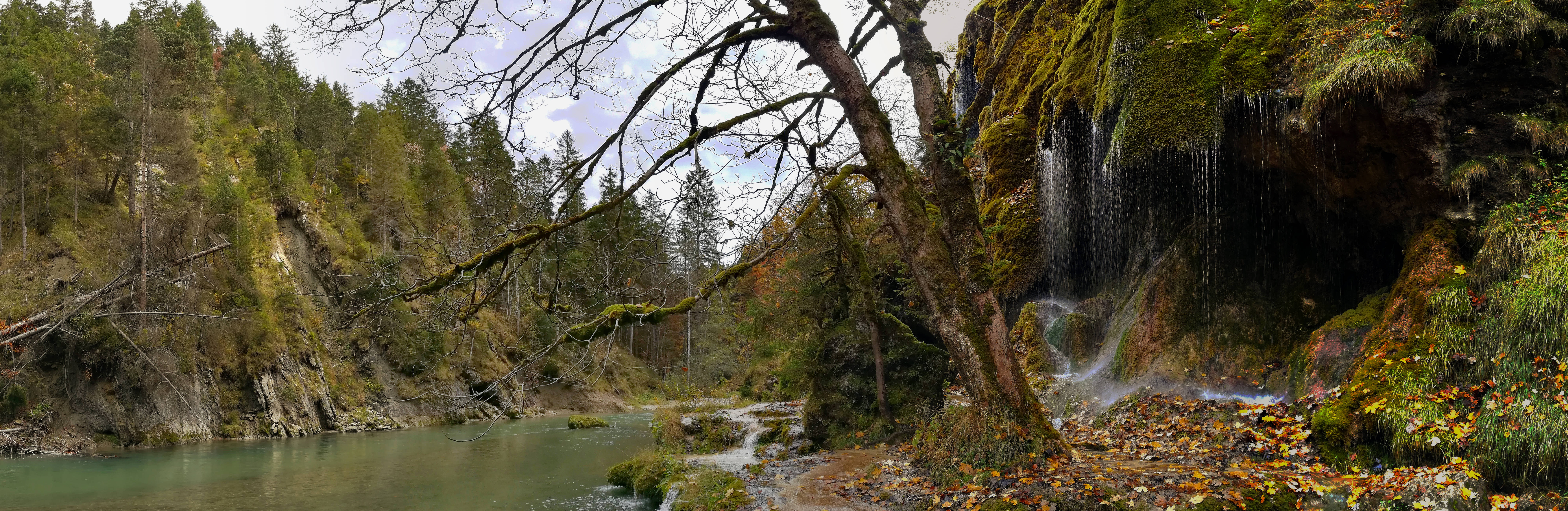 Herbststimmung an den Schleierfällen, am Fluß Ammer, Oberbayern